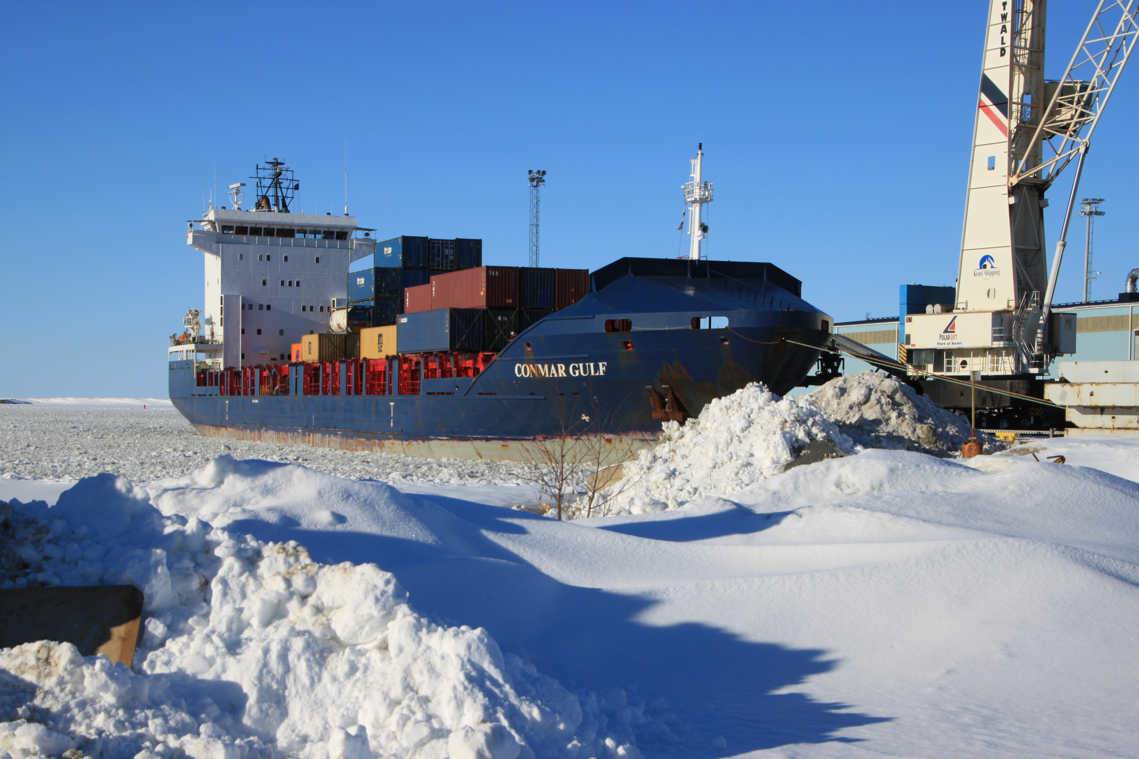 Conmar Gulf während der Beladung im Hafen Kemi (Finnland)